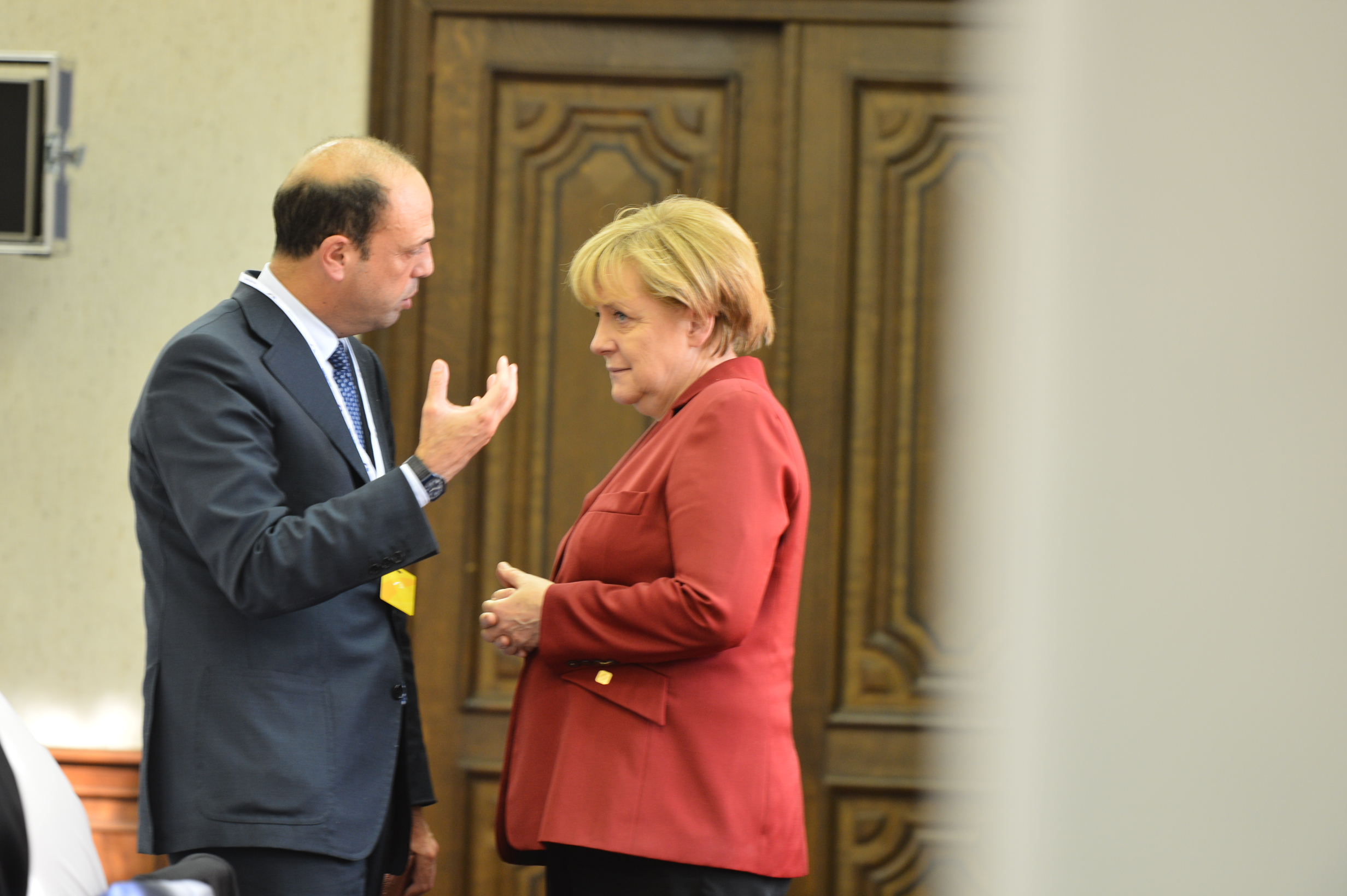 EPP Summit, Meise. Oct. 2013